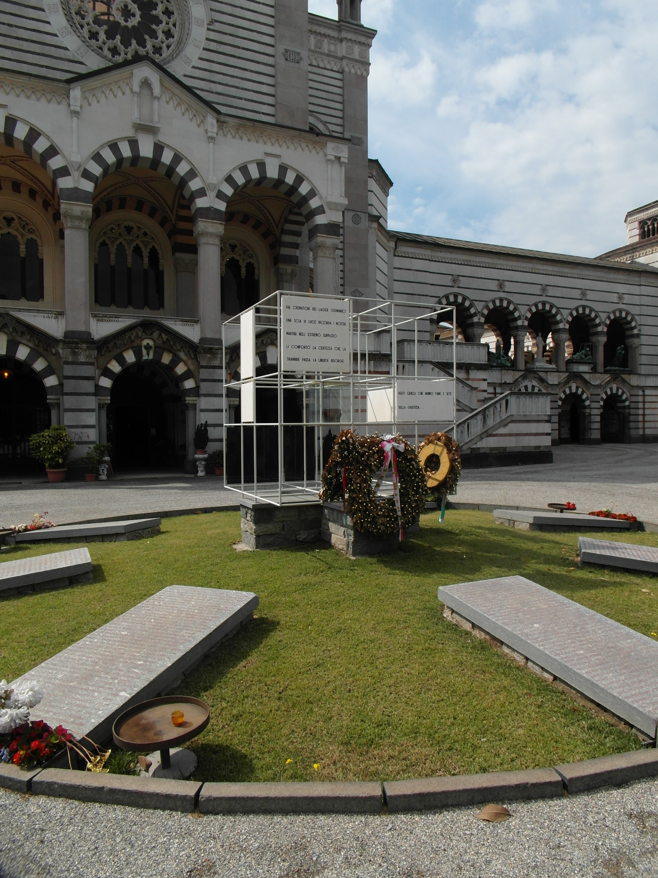 Fotografia del Monumento ai morti in campi di concentramento di BBPR con lapidi e corona d'alloro